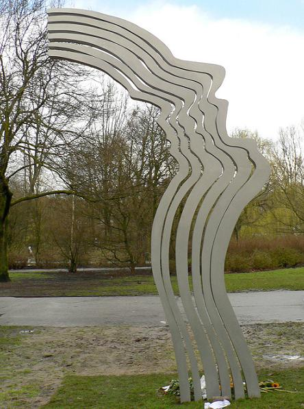 "De Schreeuw" by Jeroen Henneman, Oosterpark (Amsterdam, Netherlands). Memorial for murdered Dutch film director Theo van Gogh